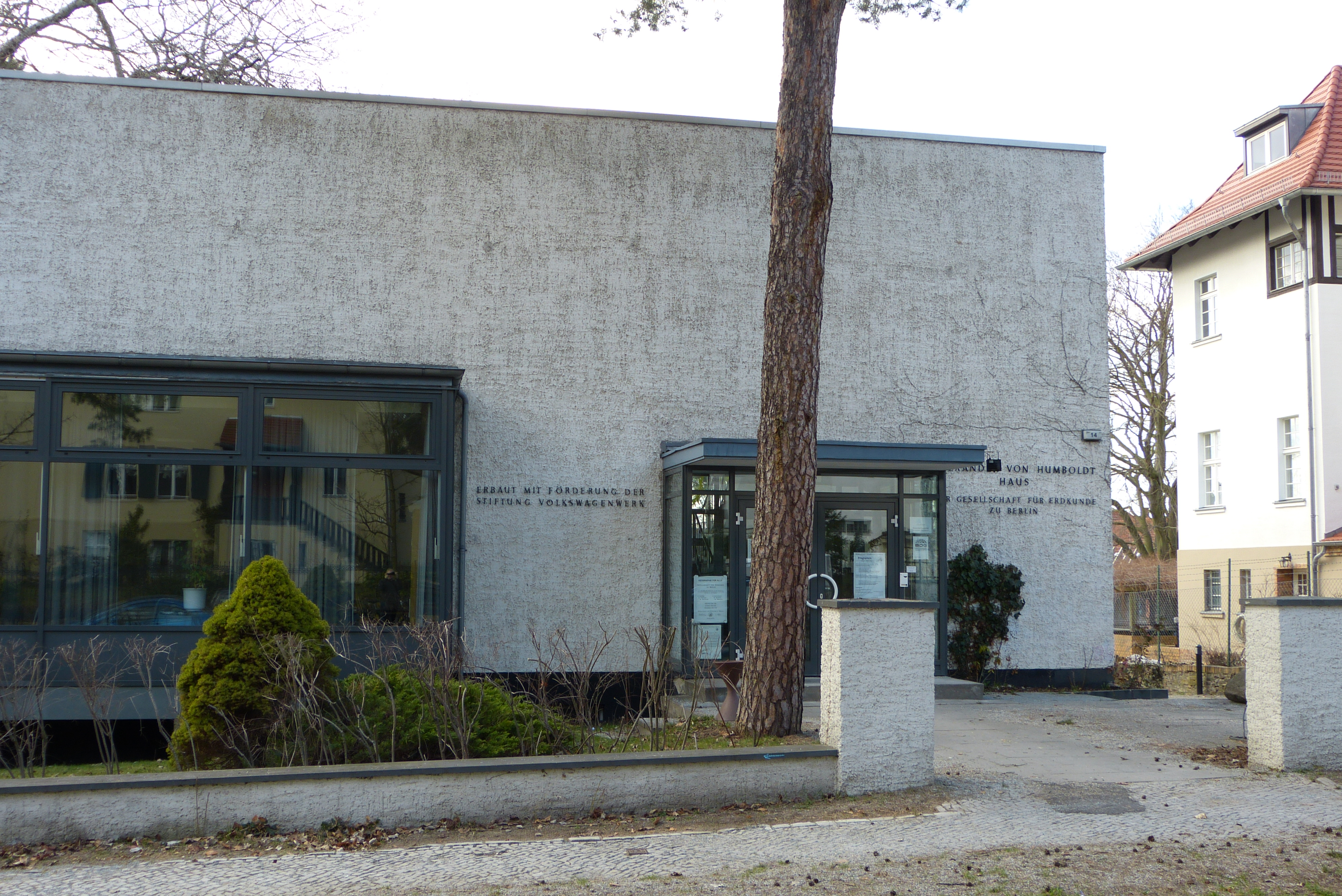 Berlin-Steglitz, Alexander-von-Humboldt-Haus, Arno-Holz-Straße 14, ehemals Gesellschaft für Erdkunde zu Berlin